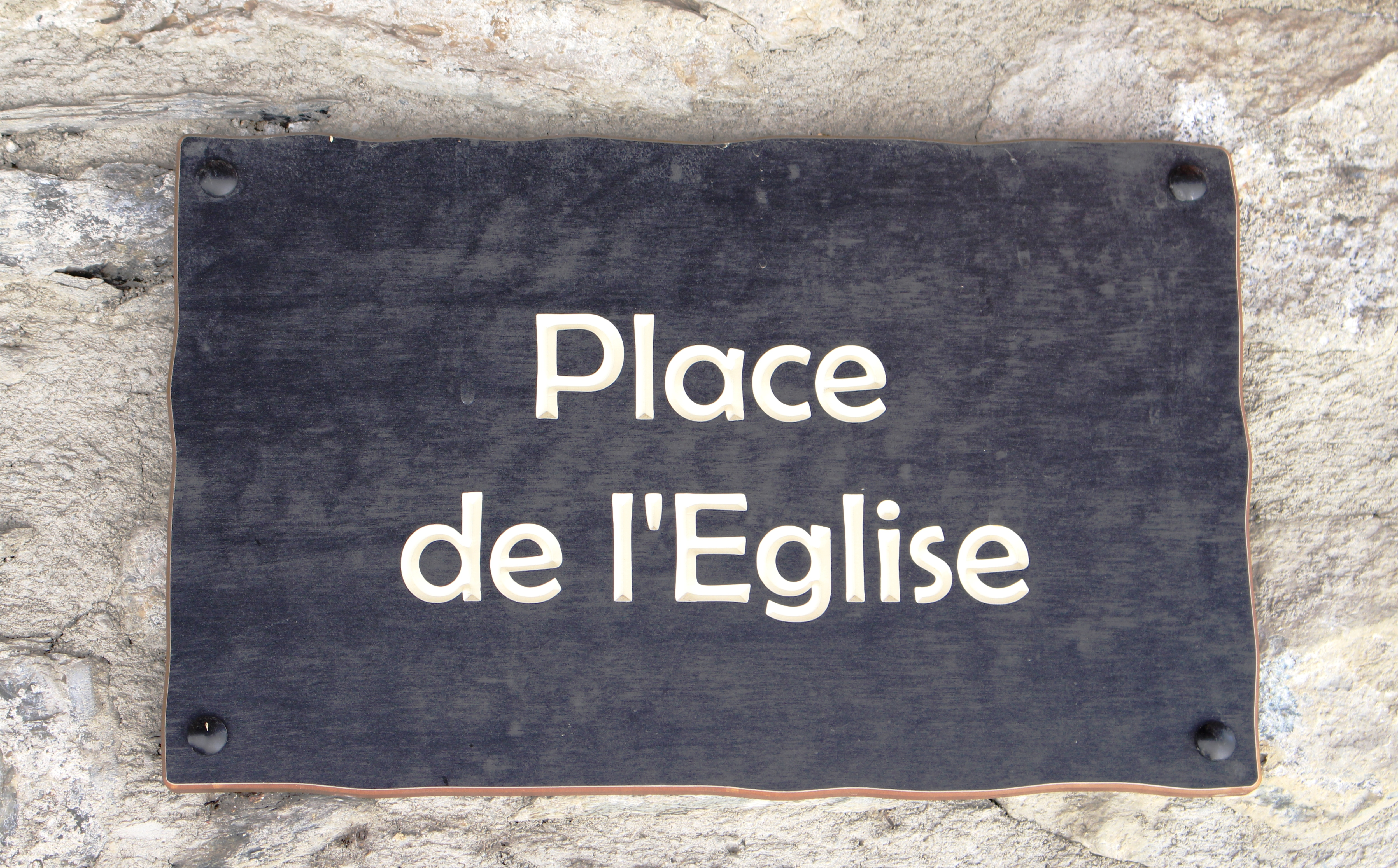 Rue du village de Vignec (Hautes-Pyrénées)